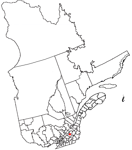 Volapük: Topam in provin: Québec.